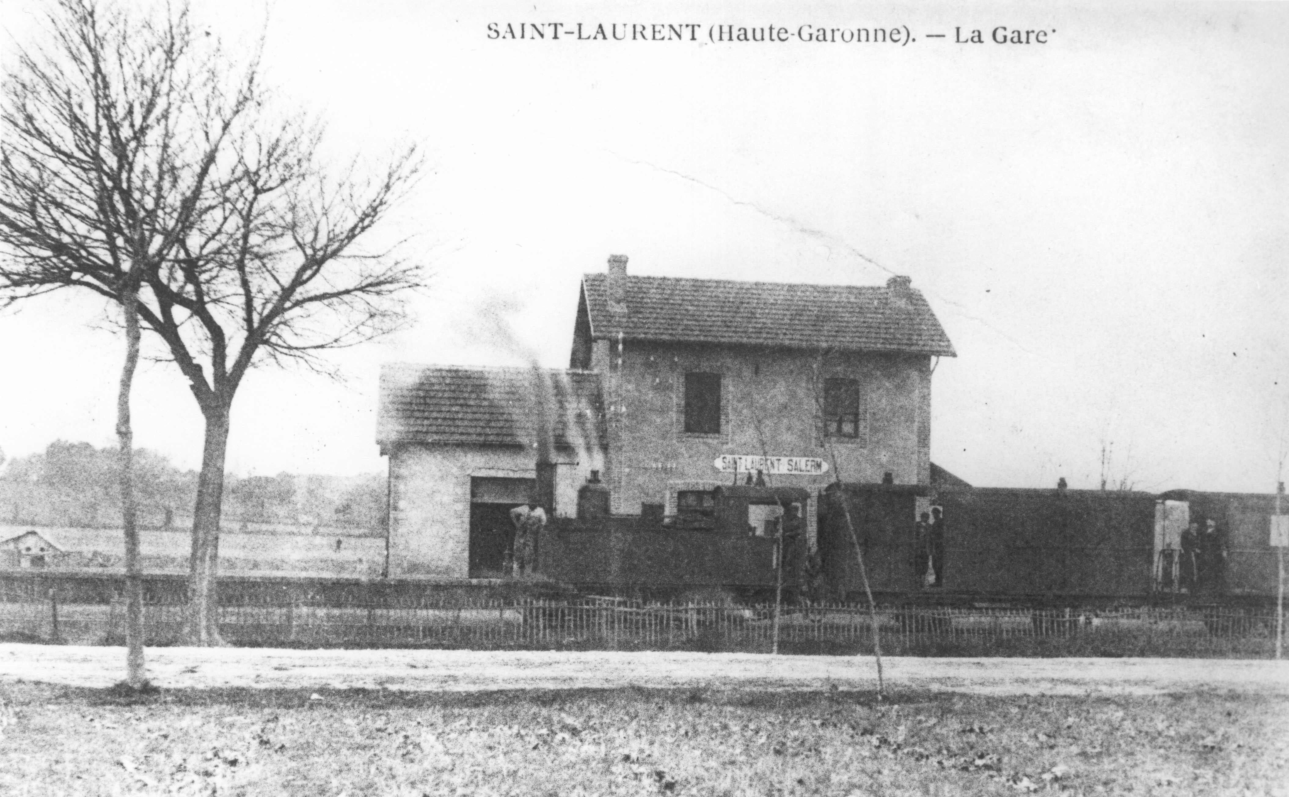 Gare de Saint-Laurent (Haute-Garonne) sur l'ancienne ligne de Chemin de Fer "Toulouse - Boulogne-sur-Gesse". Cette ligne de 98 km a fonctionné à partir du 1er août 1901. Exploitée par la Compagnie des Chemins de Fer du Sud Ouest, elle permettait en 1902 de rejoindre Toulouse en 4h00 (vapeur), puis en 2h00 (autorail électrique). Devant la concurrence de l'automobile, elle a fermé le 31 décembre 1949 et a été remplacée par la ligne 65 du réseau des bus Arc-en-ciel du département de la Haute-Garonne, effectuant le trajet dans un temps similaire. (